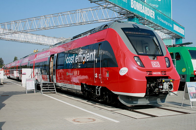 Bombardier Talent 2 (Baureihe 442) auf der Innotrans 2008 in Berlin